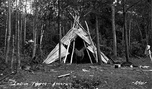 Indian Tepee, Kenora, Ontario.